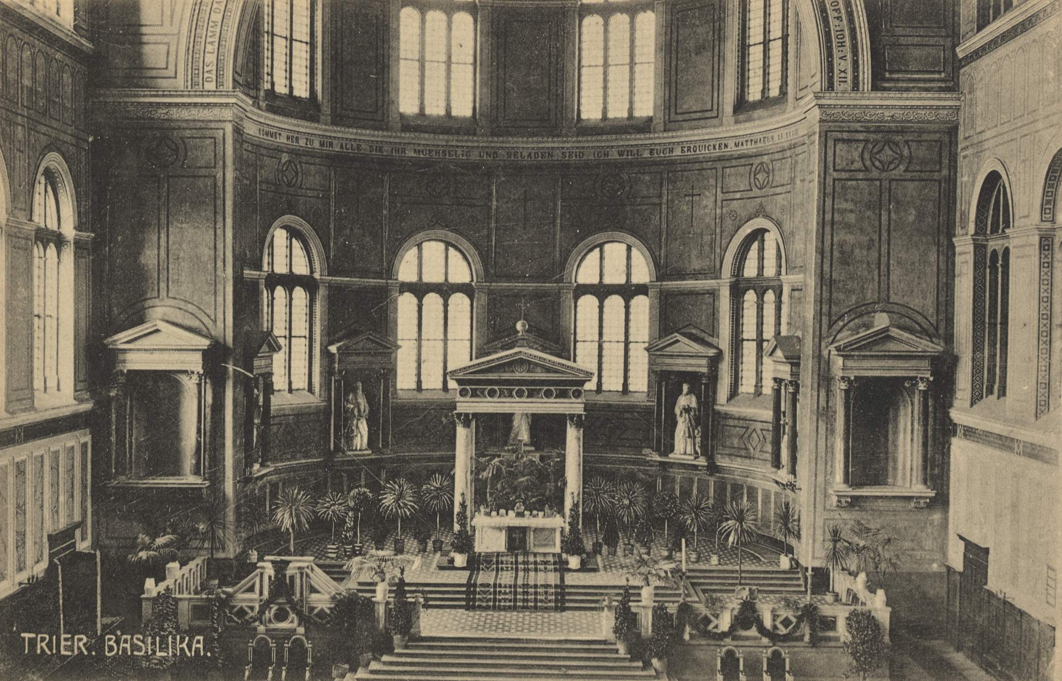 Basilika, Altarraum